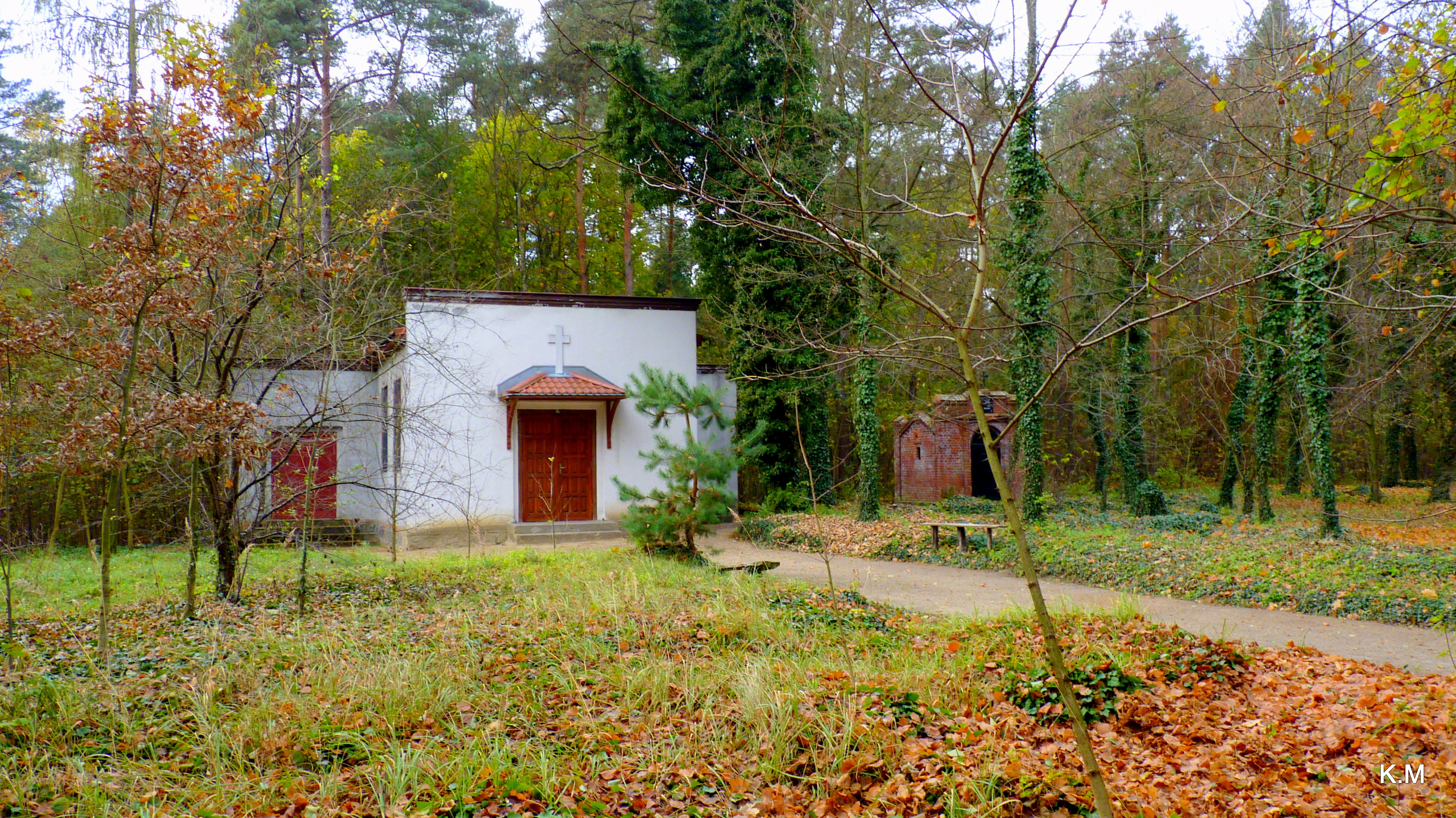 2012- 11. 01 Sępólno Krajeńskie - widok kaplicy wyznania ewangelicko-augsburskiego